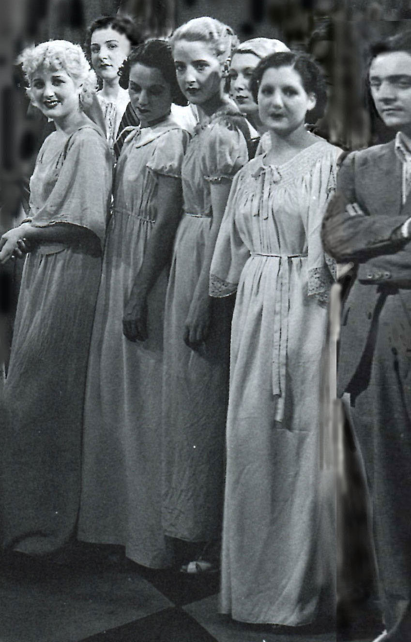 Il serpente a sonagli (Matarazzo, 1935) - foto sul set con il regista Matarazzo e 5 attrici del cast, tra le quali, al centro, Lilla Brignone.